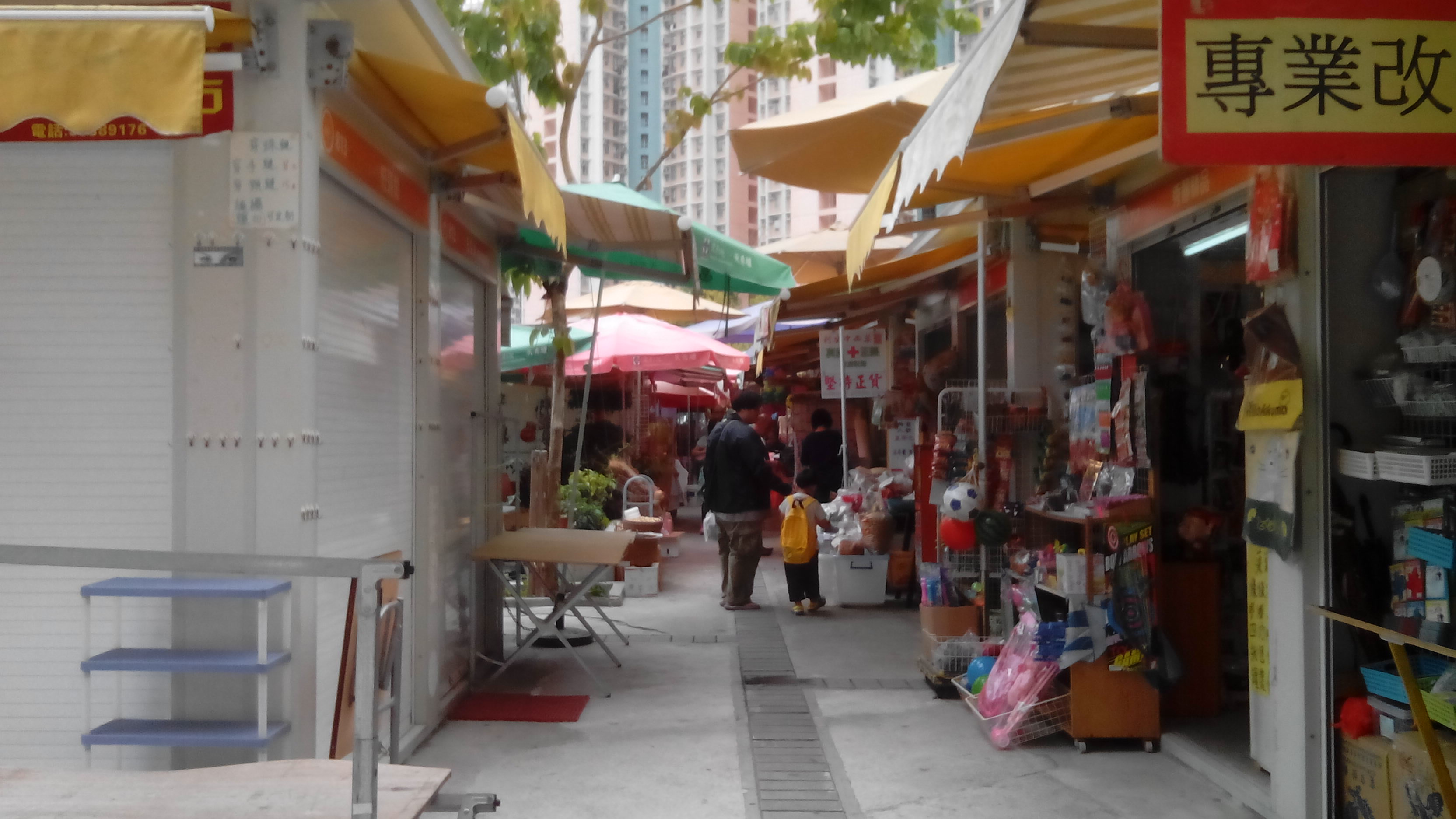 天秀墟的走廊